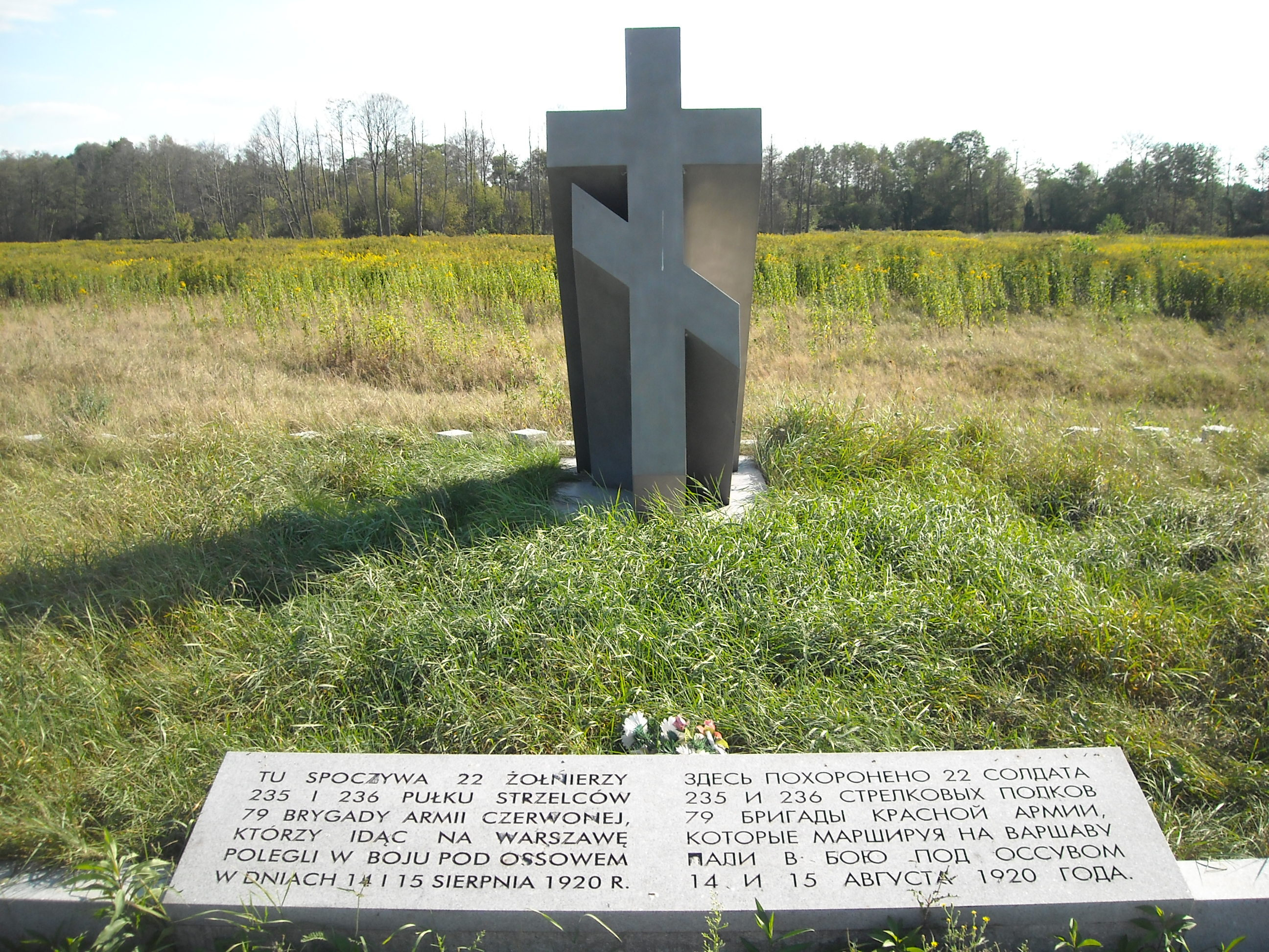 Pomnik nagrobny 22 żołnierzy bolszewickich poległych podczas Bitwy Warszawskiej (1920) na Polakówej Górce w Ossowie.